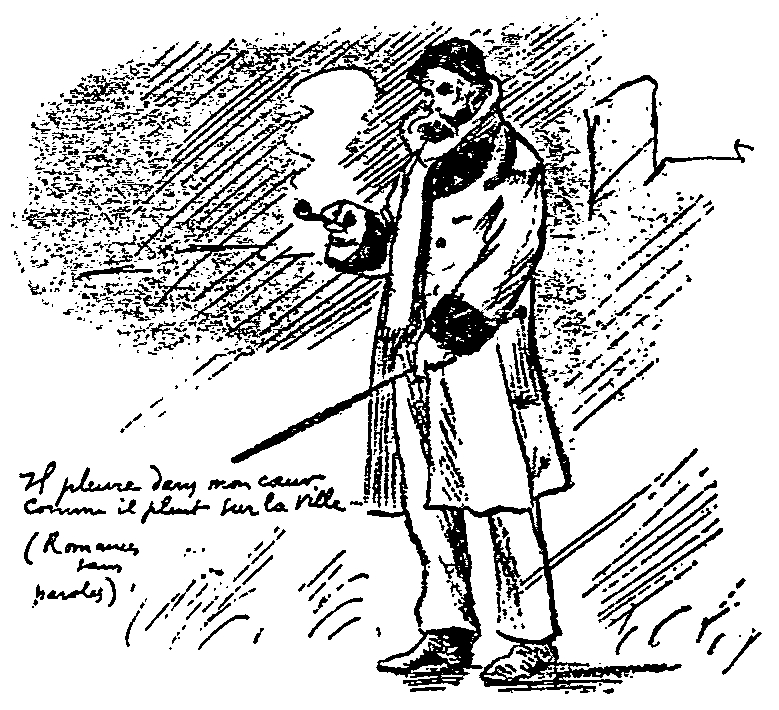 Portrait de Paul Verlaine (1844-1896) par Frédéric-Auguste Cazals (1865-1941) dessiné lors de la mort de l'auteur avec la citation Il pleure dans mon cœur.